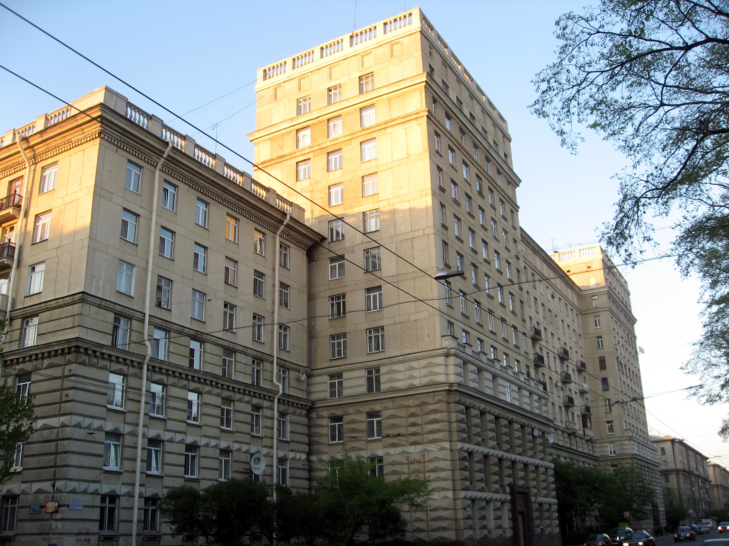 Sankt-Petěrburg